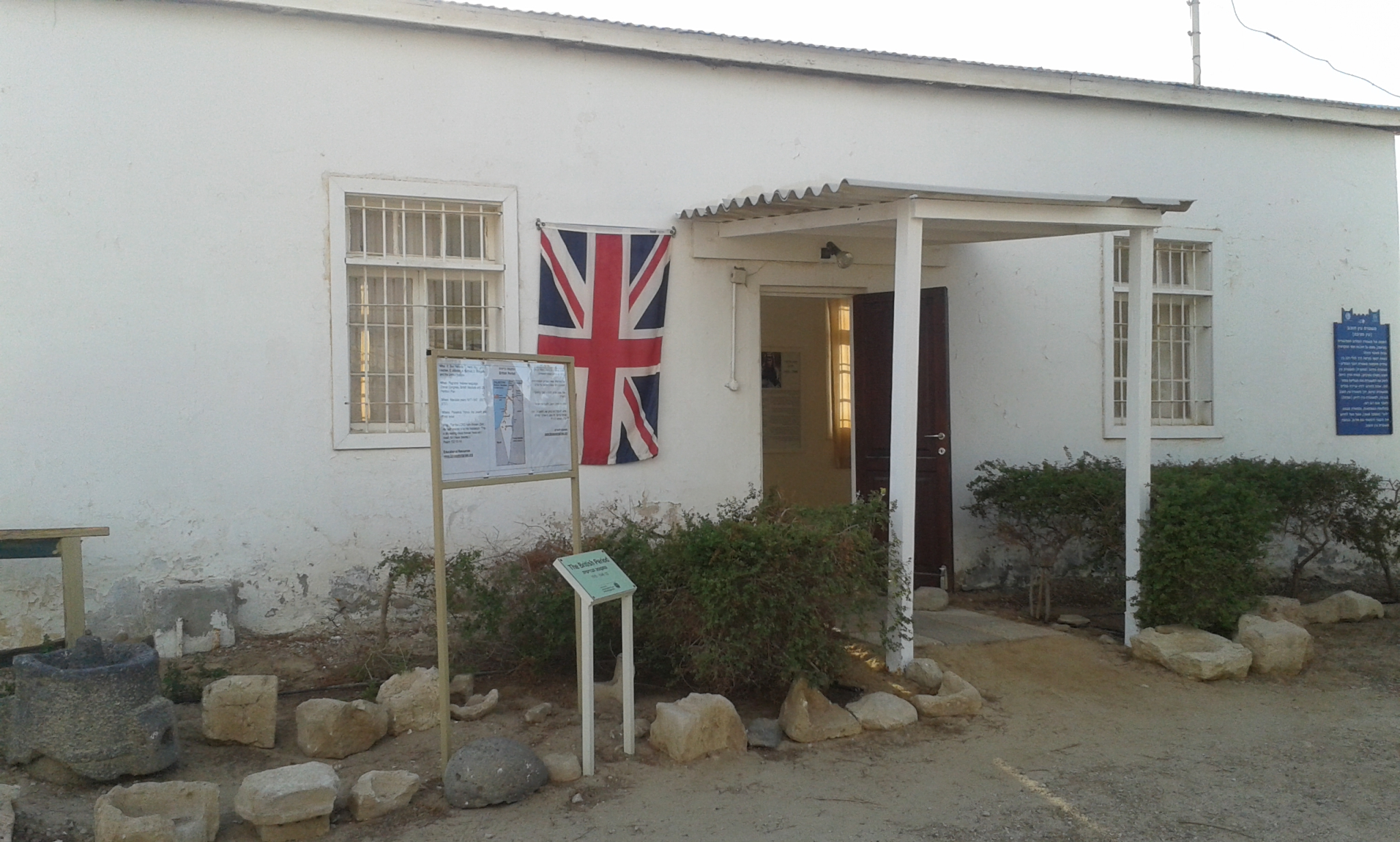 משטרת עין חוצוב